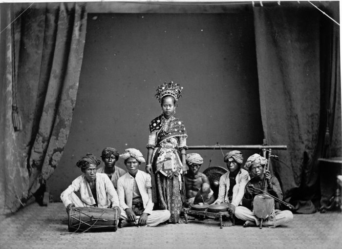 Foto. Een Ronggeng danseres in Batavia